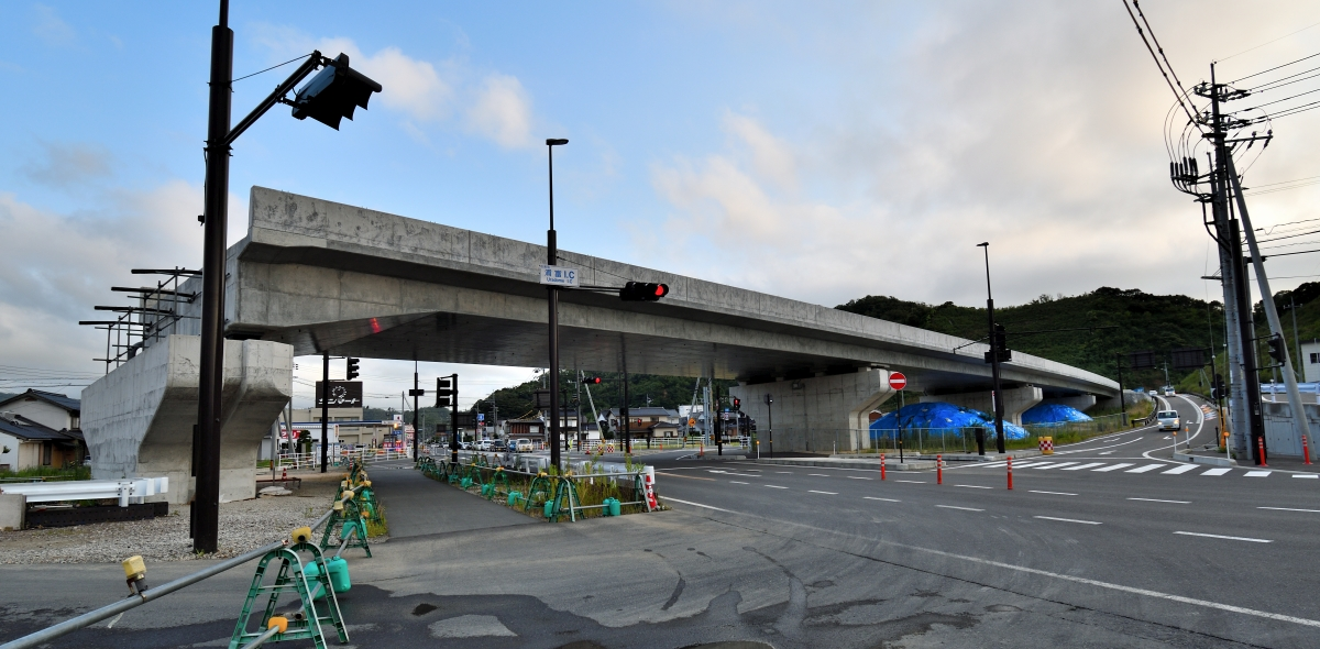 山陰近畿自動車道浦富インターチェンジ（鳥取県岩美郡岩美町浦富）、撮影当時はここから先は建設中。